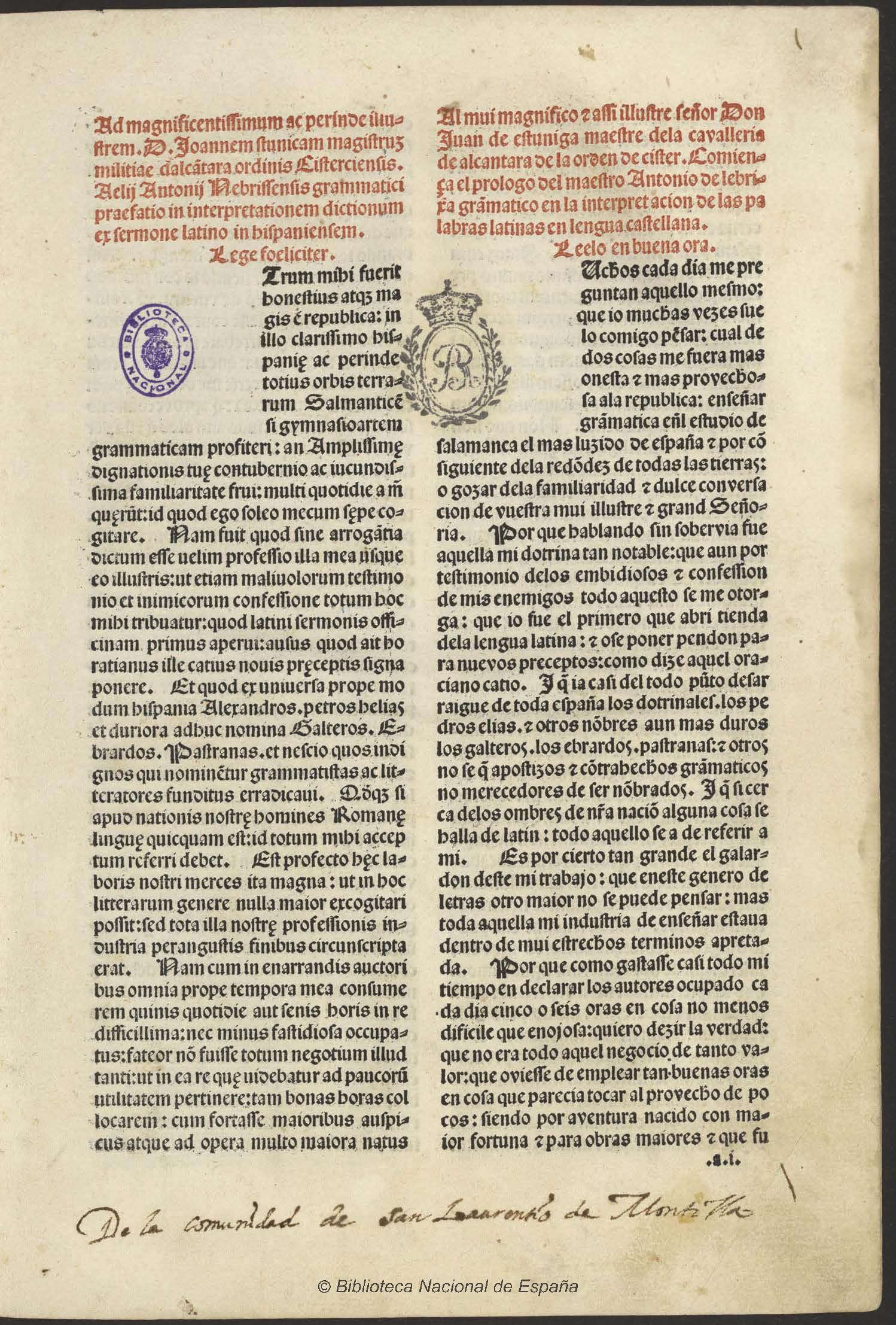 [Dictionarium latino-hispanicum] Dictionarium latino-hipanicum [Texto impreso]. - Salamanca : [Typ. Nebrissensis: «Gramática»(Haeb. 470)], 1492. - h. ; Fo l. Signatura Inc/1778(1)